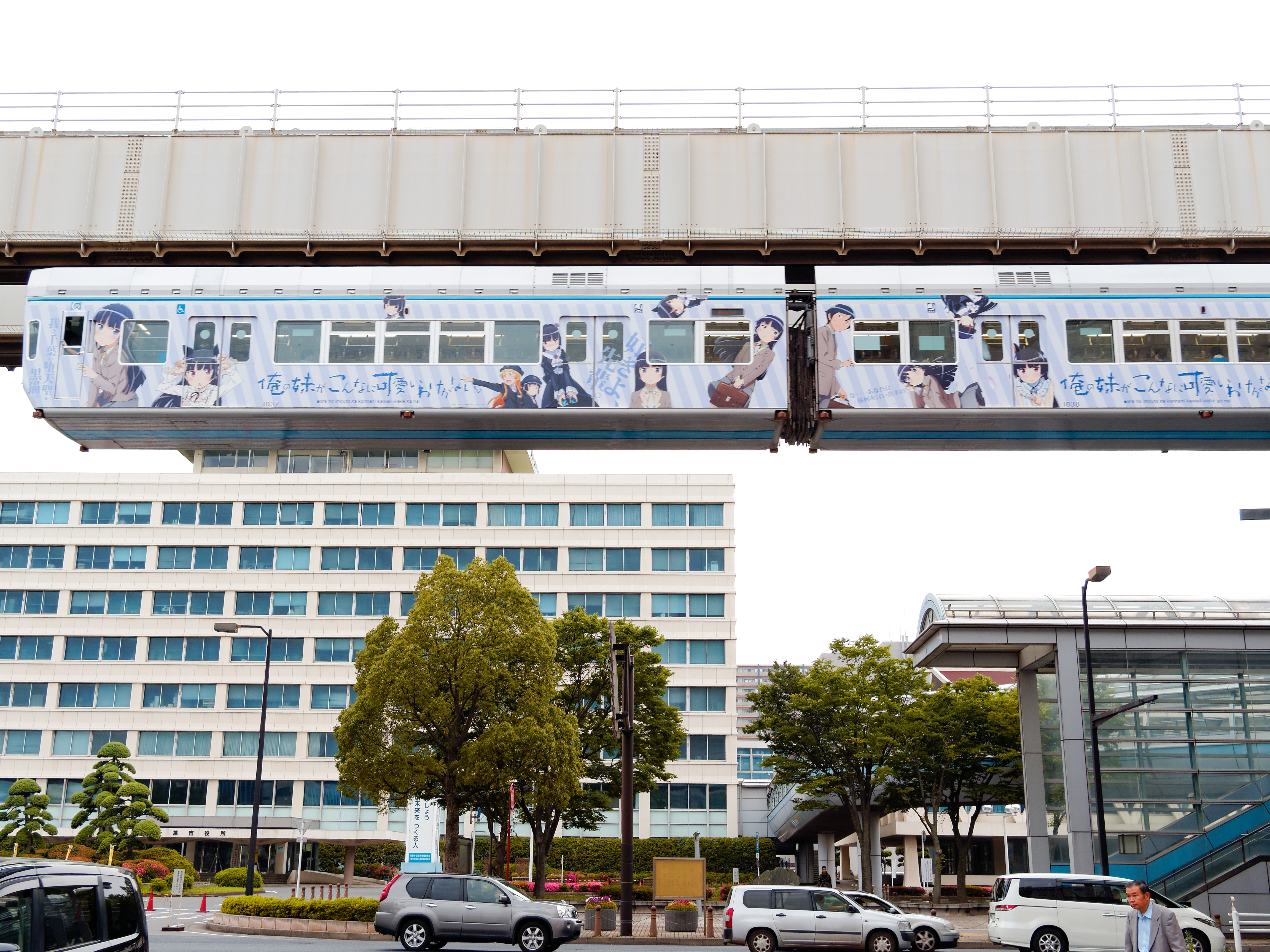 千葉都市單軌電車《我的妹妹哪有這麼可愛！》痛電車。